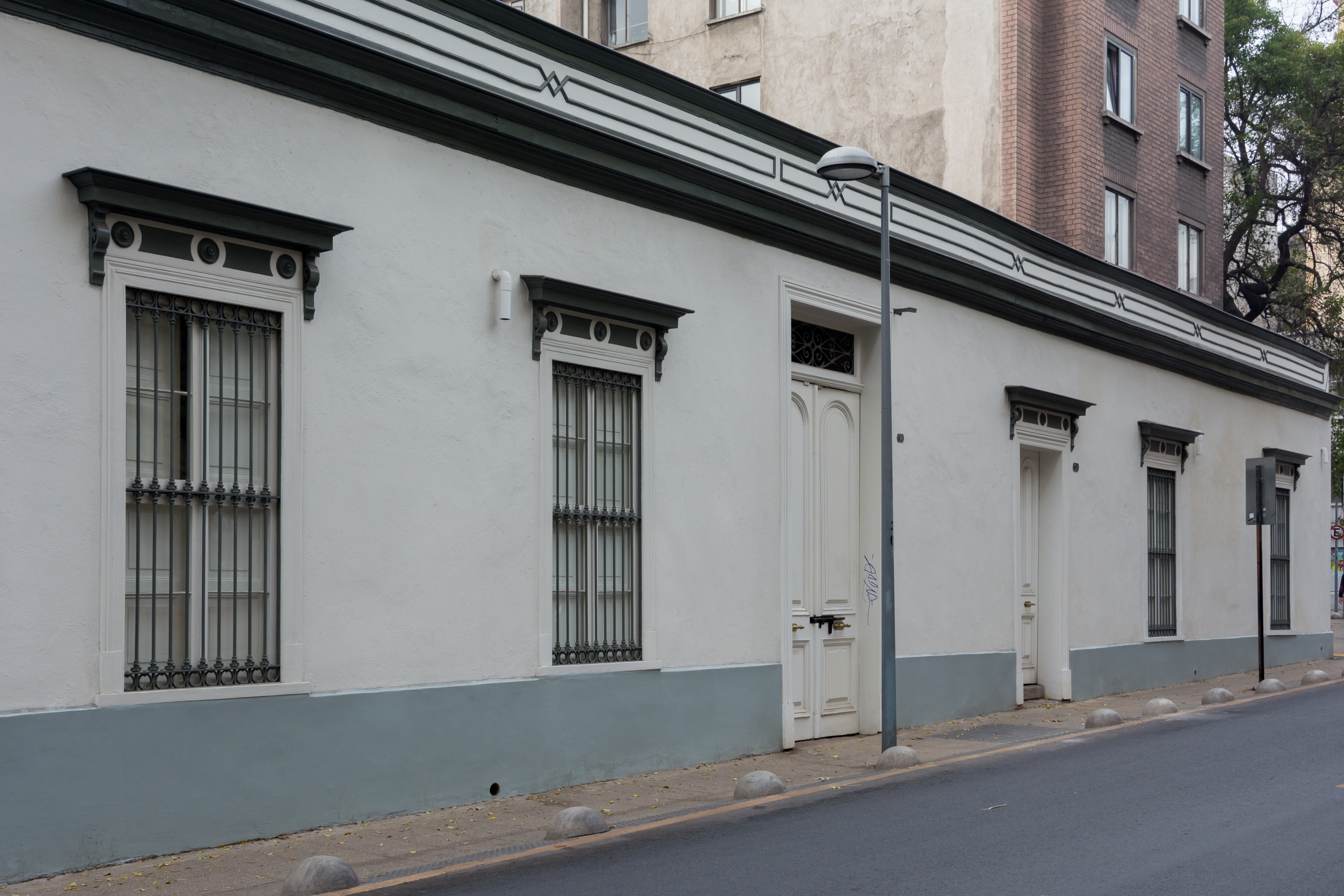 Casona Santo Domingo 627, Santiago, Chile.